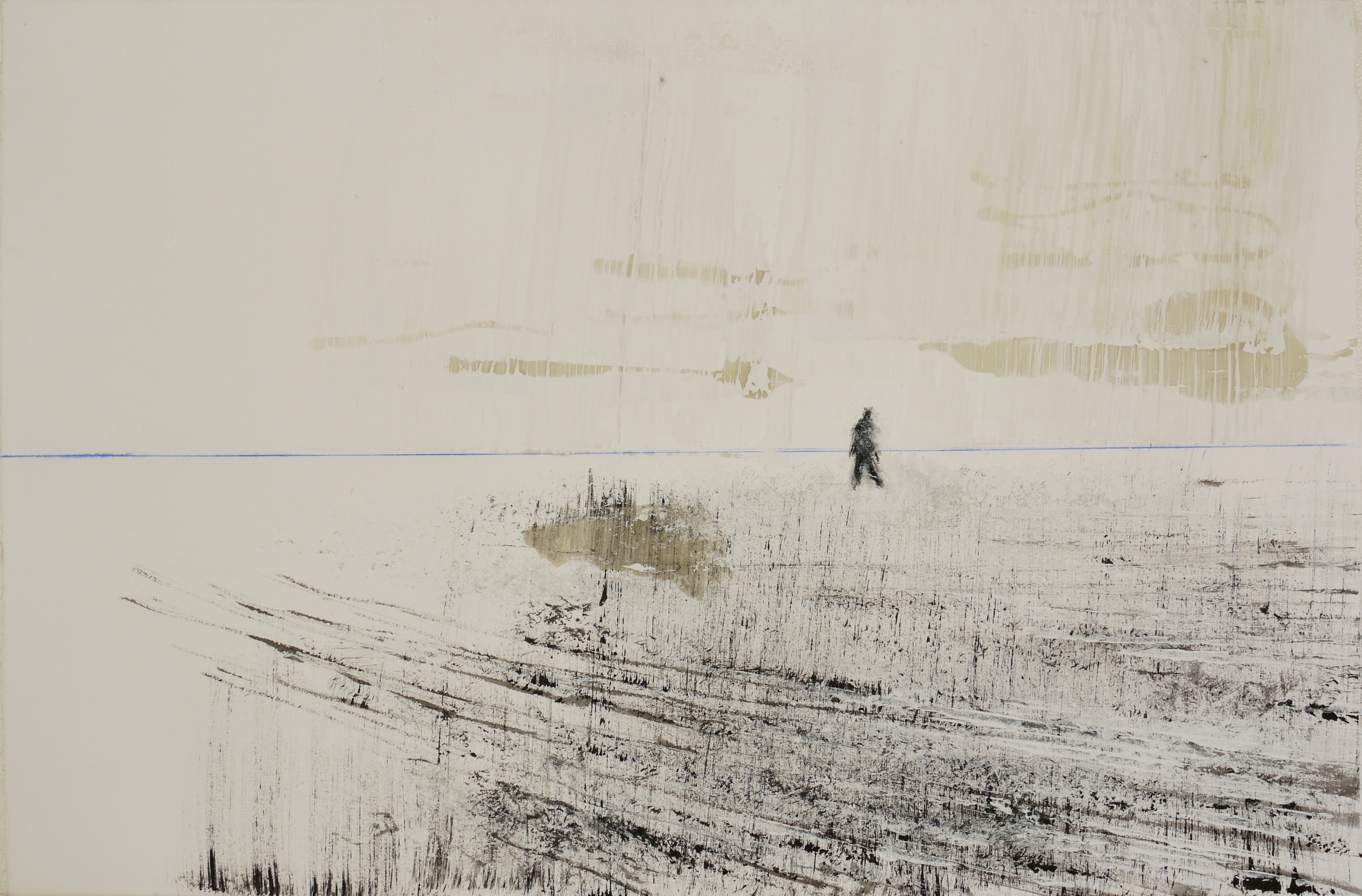 La plaine jusqu’à l’homme, version 4, 2011, Encre de Chine, acrylique, trait bleu et résine polyester sur papier Hahnemühle, 80,5 x 122